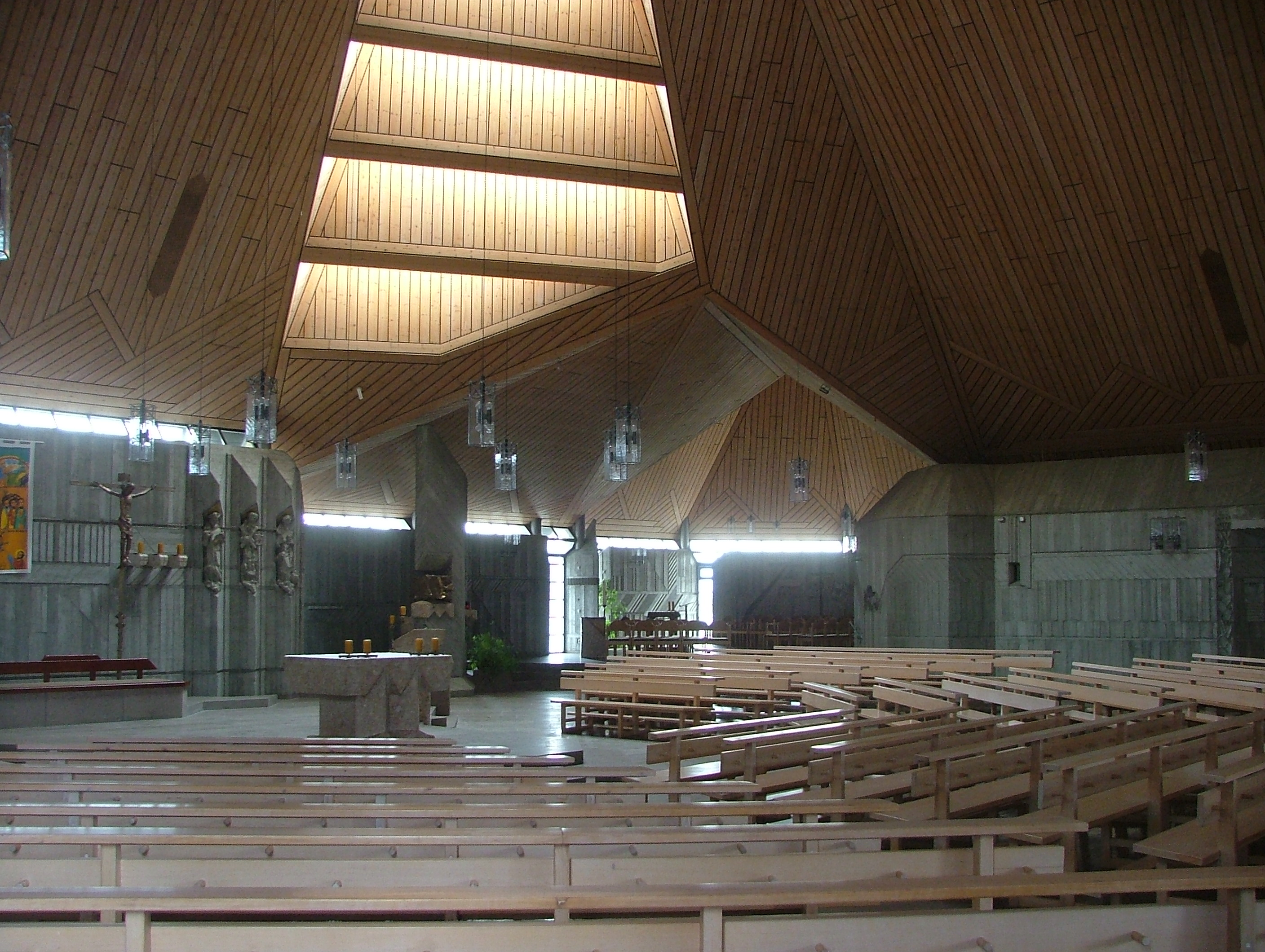 St.Hedwig